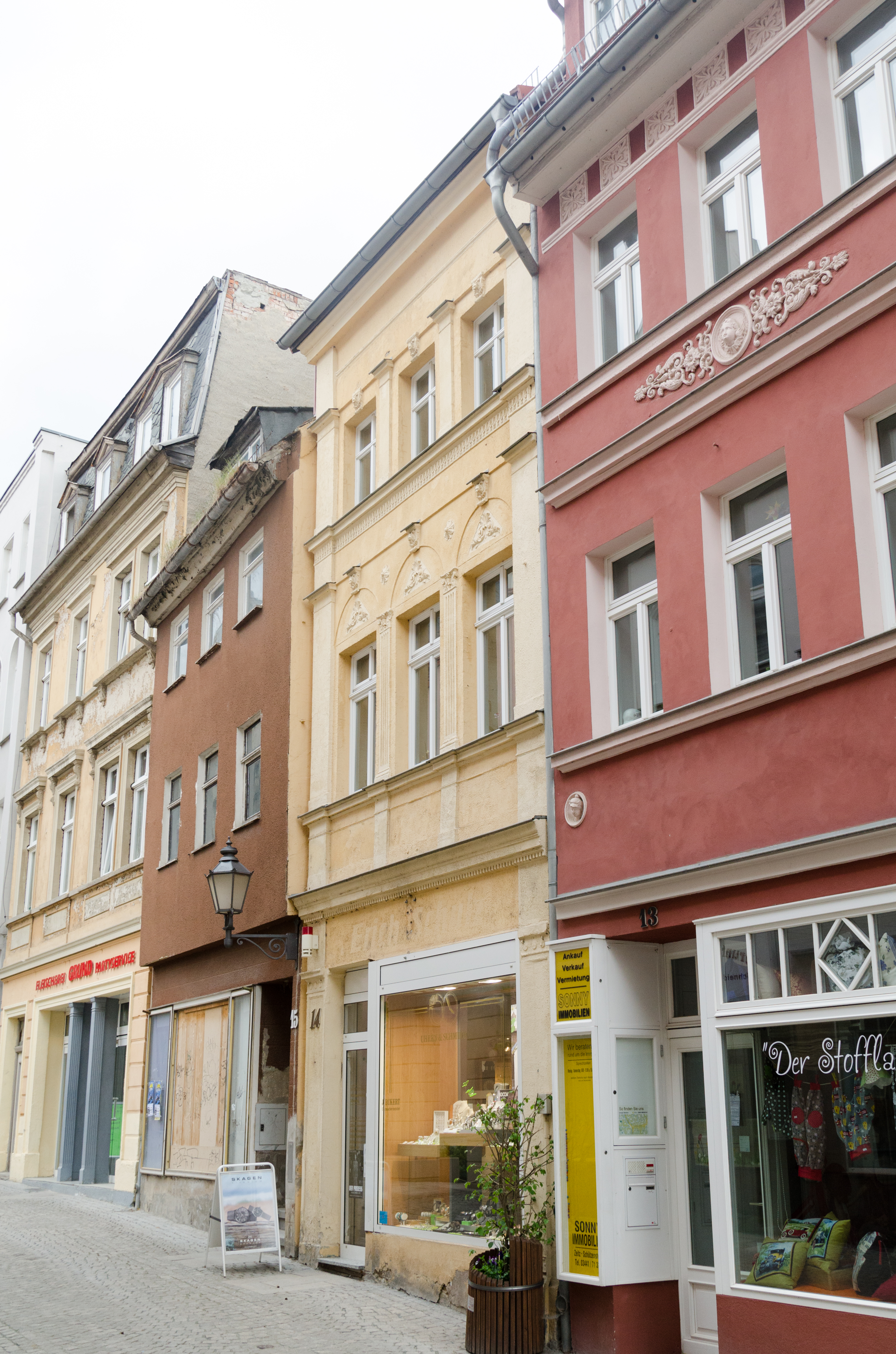 Zeitz, Kramerstraße 14